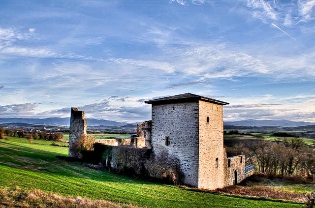 Los Guevara fueron una de las familias nobles de Euskadi. En la localidad que lleva su nombre, construyeron primero un castillo (en el siglo XI) en lo alto de una colina. Siglos más tarde, en el XIV, se edificó la Torre y Palacio de Guevara a los pies de esa colina. No obstante, la tragedia asoló a estos edificios y sus habitantes durante la II Guerra Carlista. Ambos fueron asediados y quedaron totalmente destruidos. Durante años, este lugar ha quedado vacío pero, últimamente, el palacio ha sido reconstruido en parte.